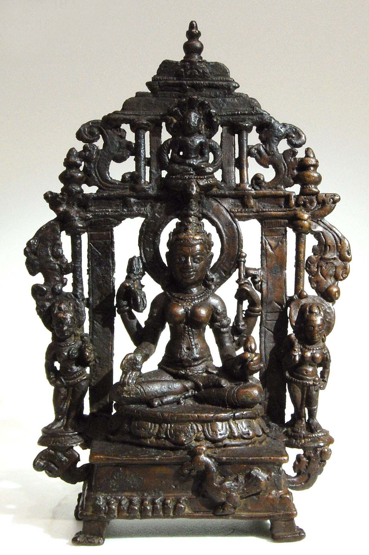 India (Gujarat); Figure; Sculpture